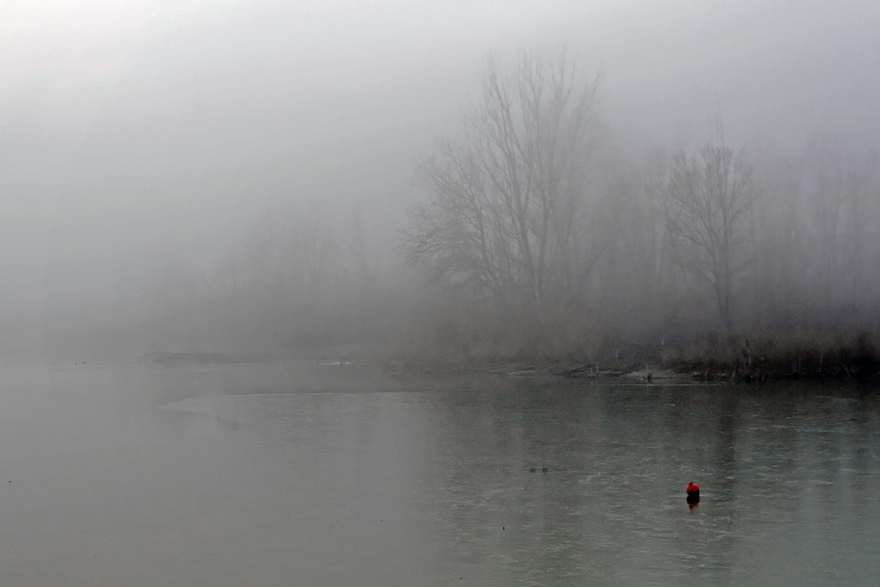 Campogalliano (MO)